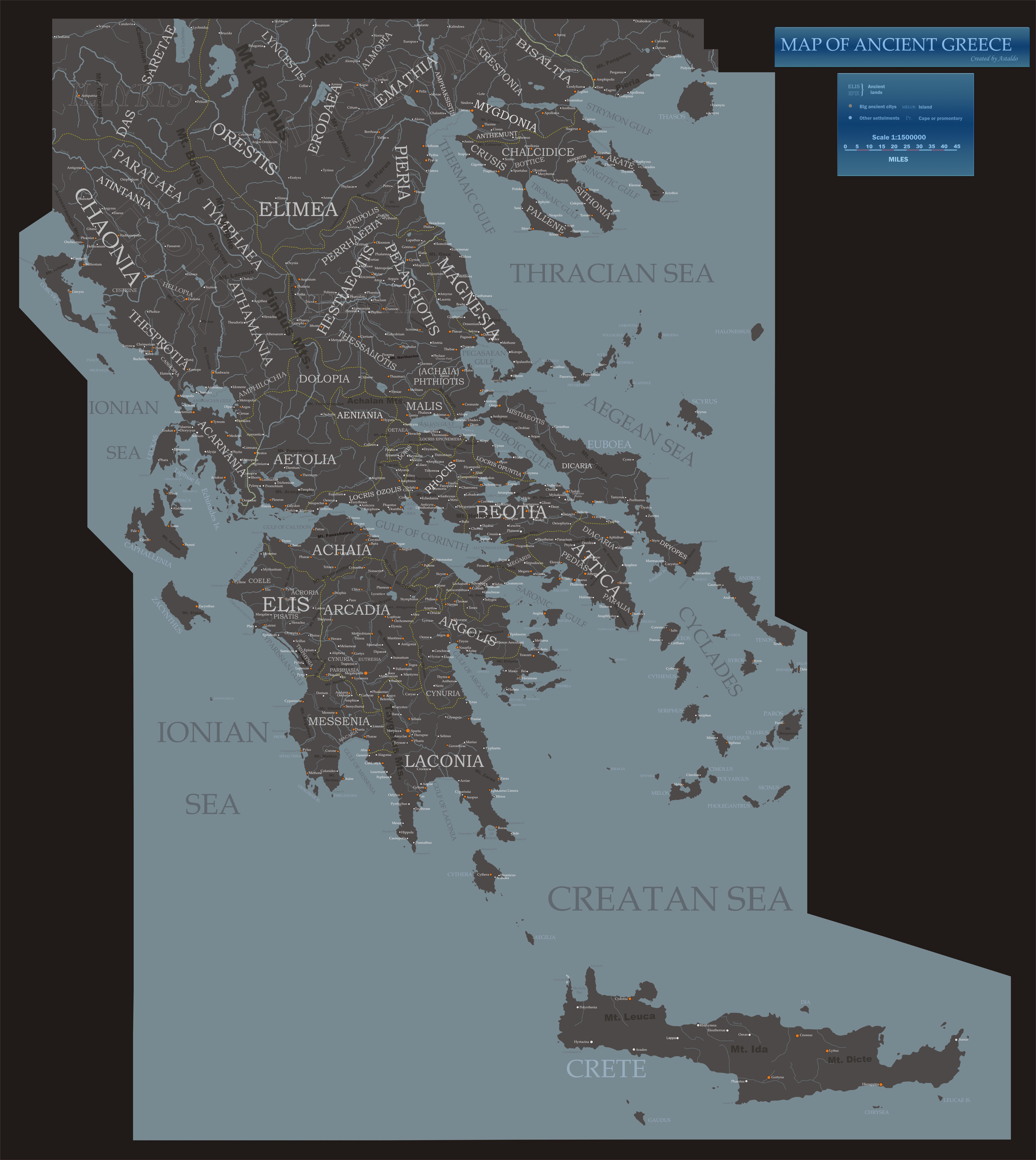 Ancient Greece - Starozytna Grecja